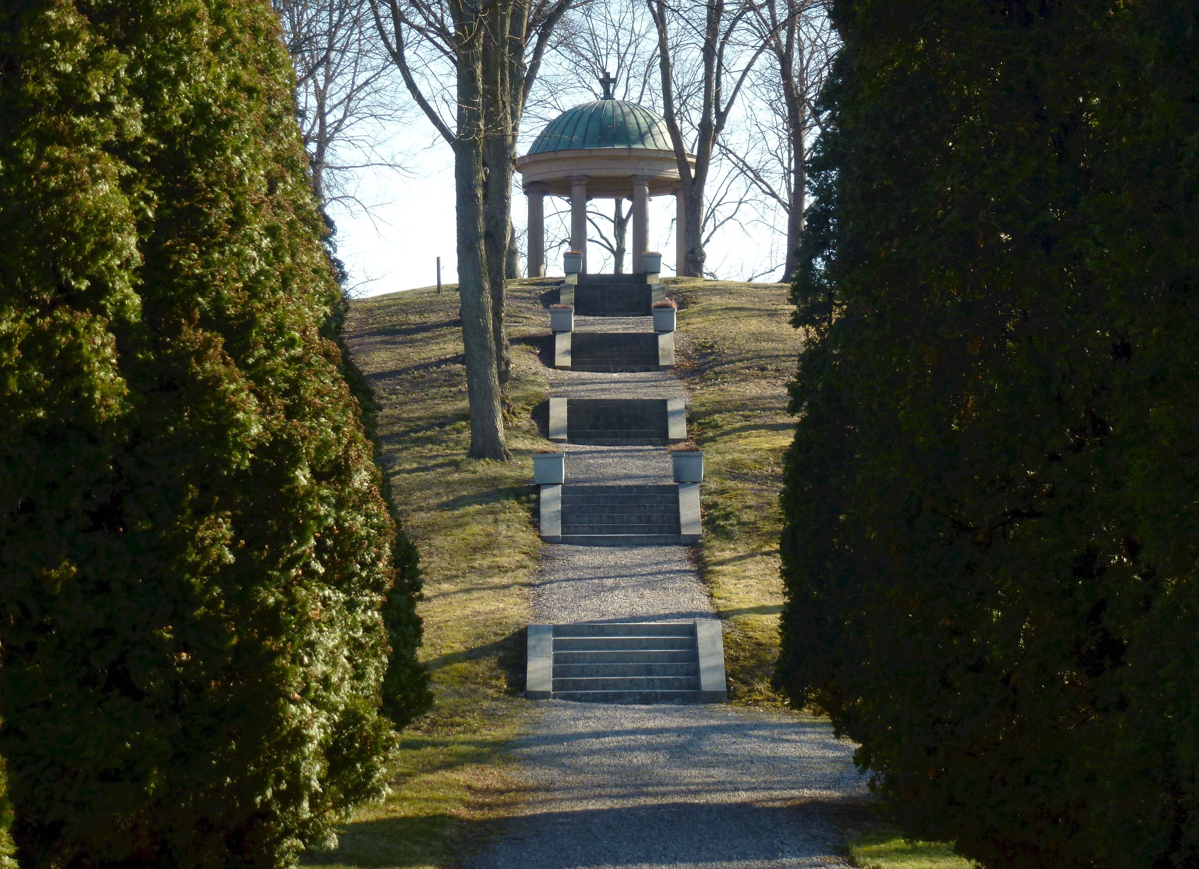 Wallenberg-mausoleum, templet